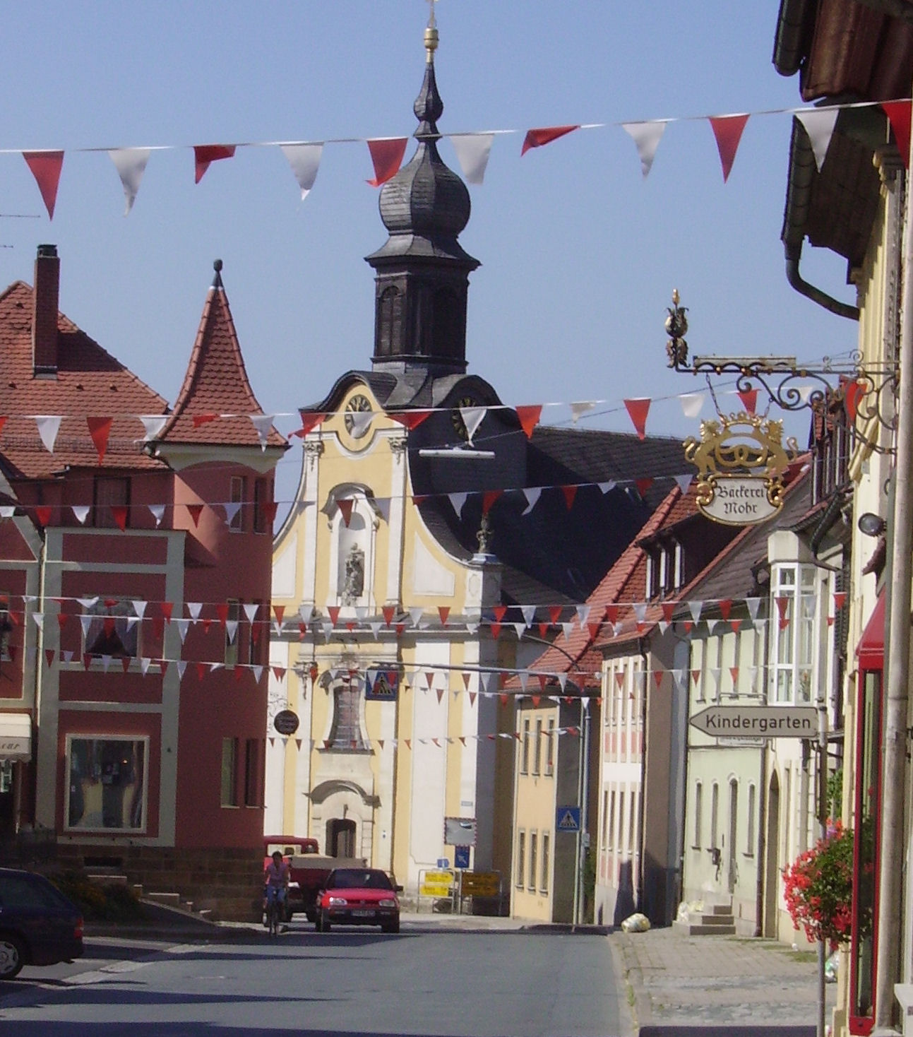 Scheßlitz near Bamberg (Franconia)